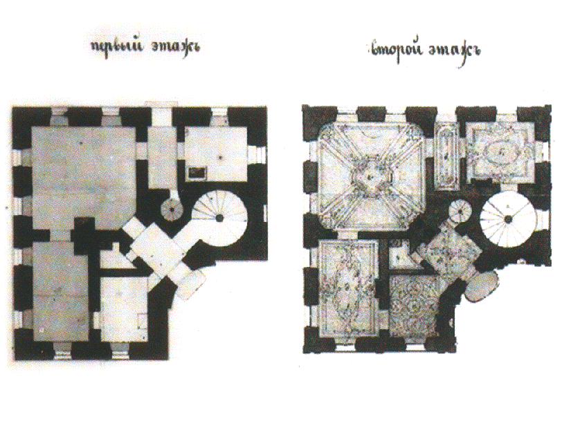 Чертеж "План дворца императора Петра III в г. Ораниенбауме". Архитектор Г. А. Прейс. Вторая половина XIX века